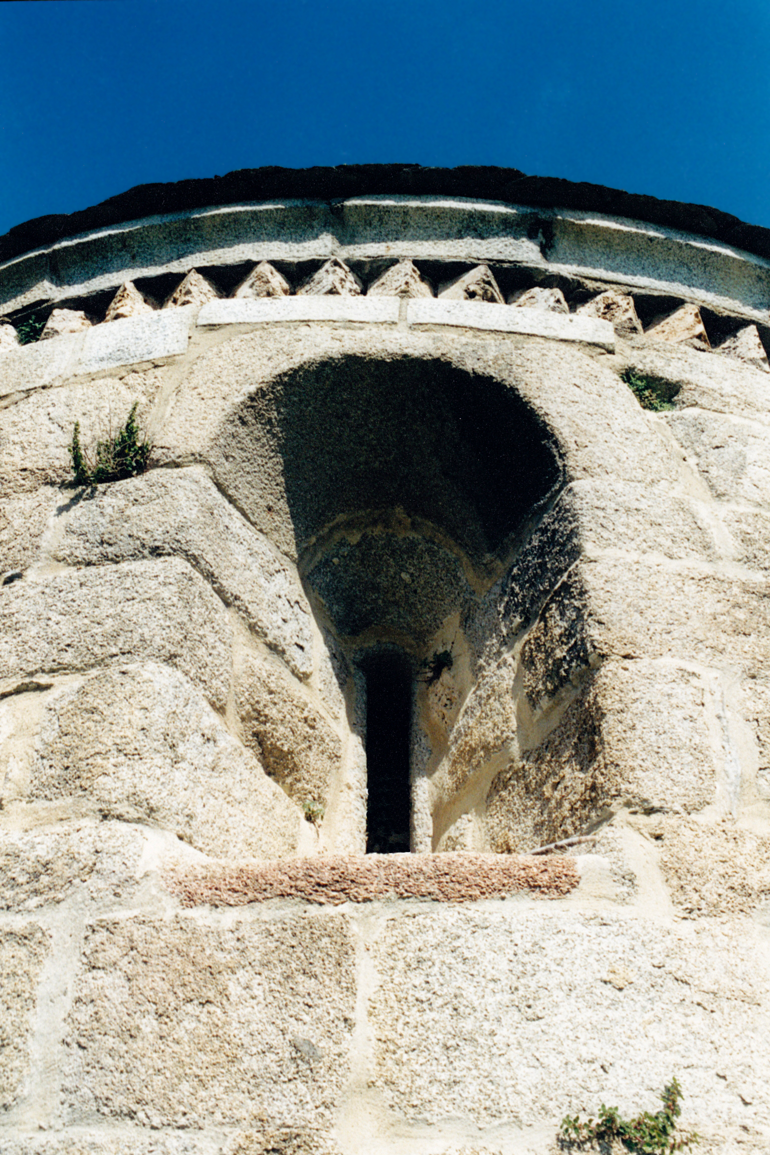 France - Pyrénées Orientales - Vallespir - Église Saint-Martin de Corsavy